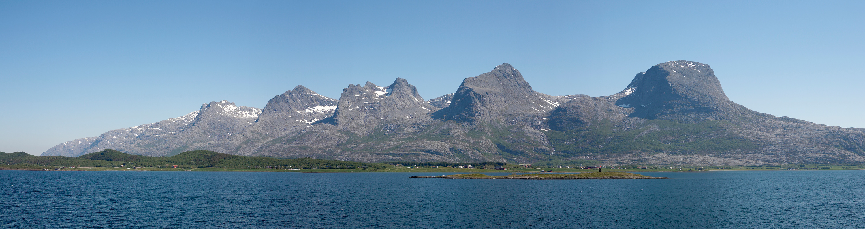 Seven Sisters